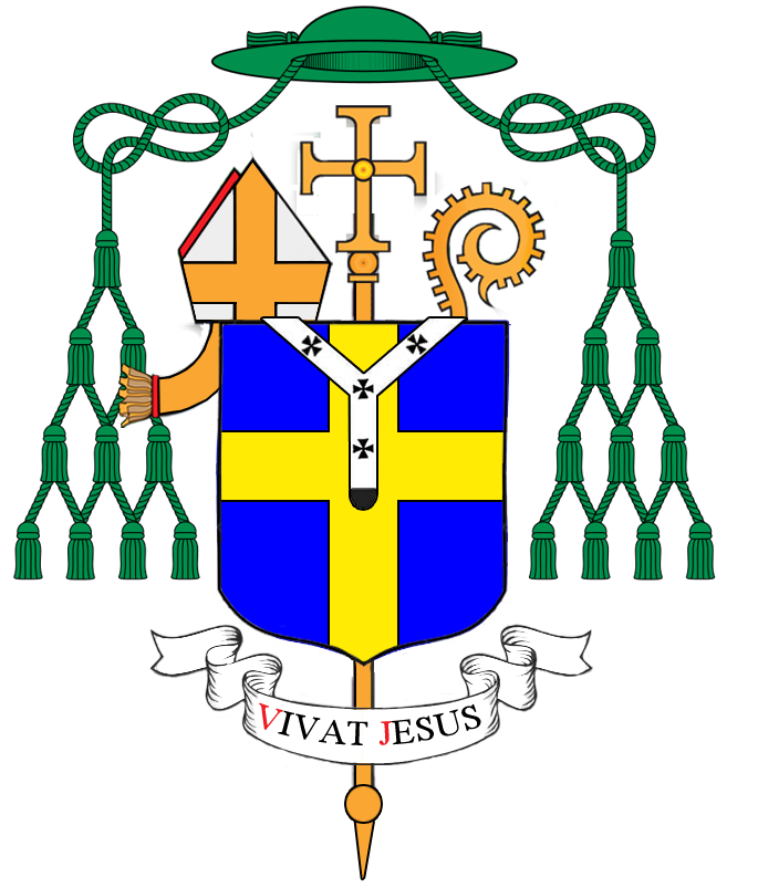 Wapenschild van Antonius Stillemans